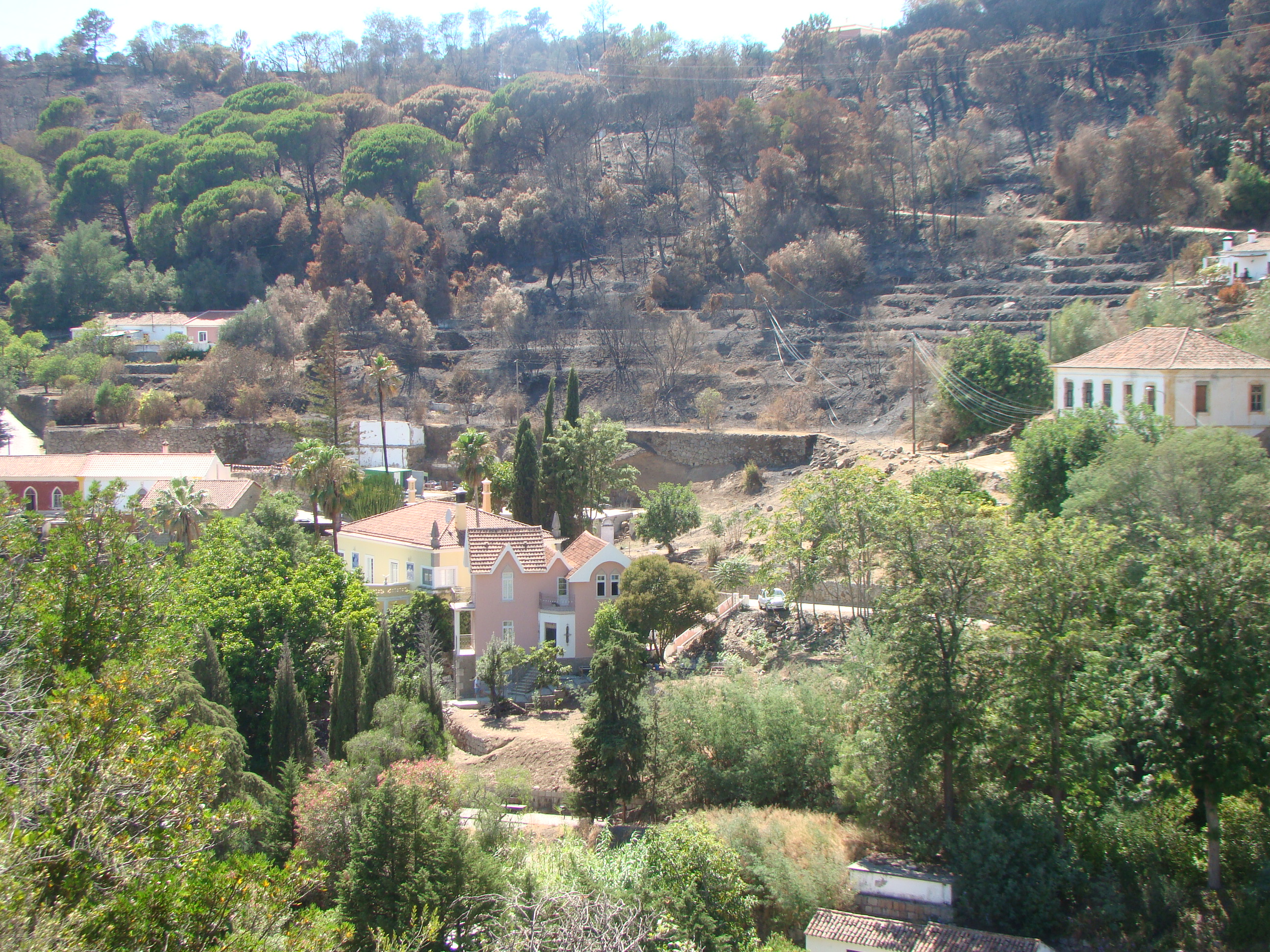 O incêndio de Monchique de 2018 aproximou-se da estância termal de Caldas de Monchique, tendo levado à evacuação de pessoas e de duas unidades hoteleiras.